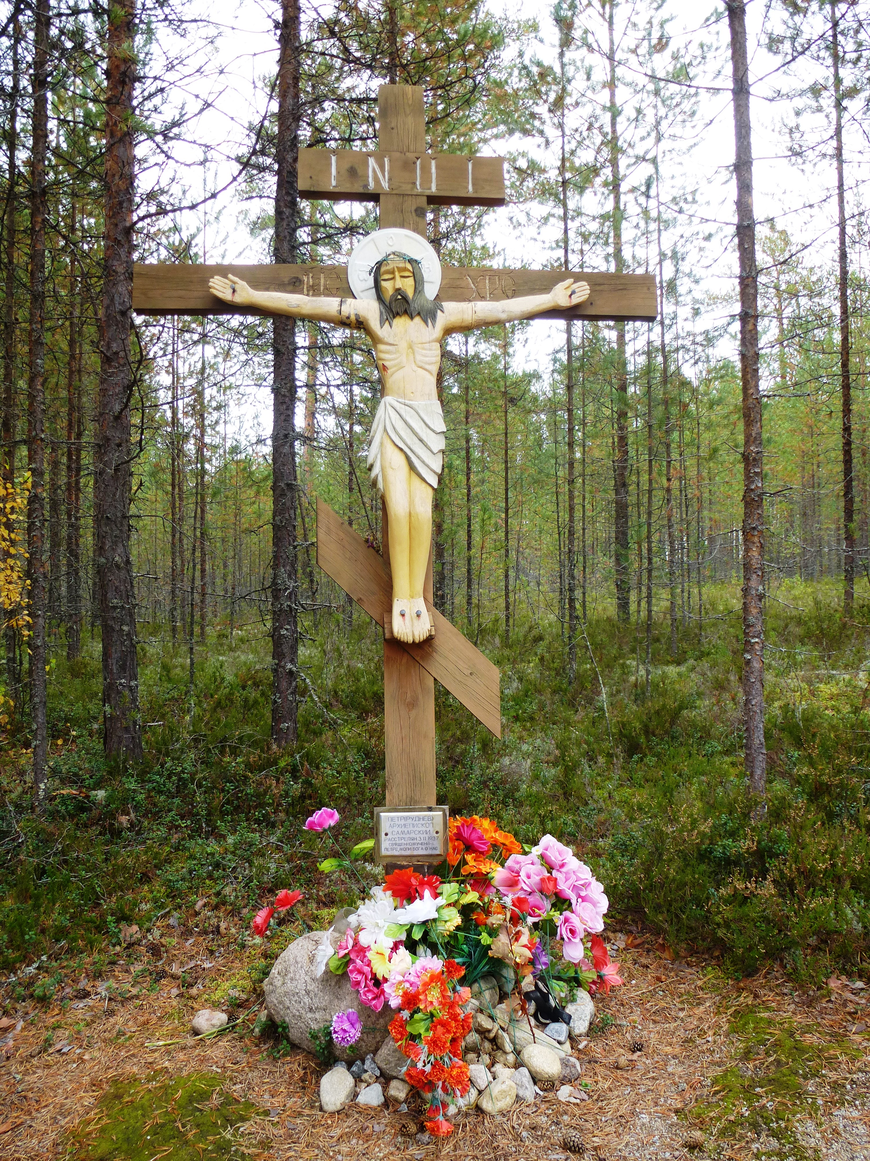 Поклонный крест на месте массовых казней в урочище Сандормох вблизи г. Медвежьегорск, Республика Карелия.